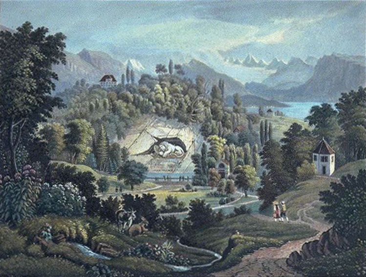 Blick auf das Luzerner Löwendenkmal mit Umgebung um 1840